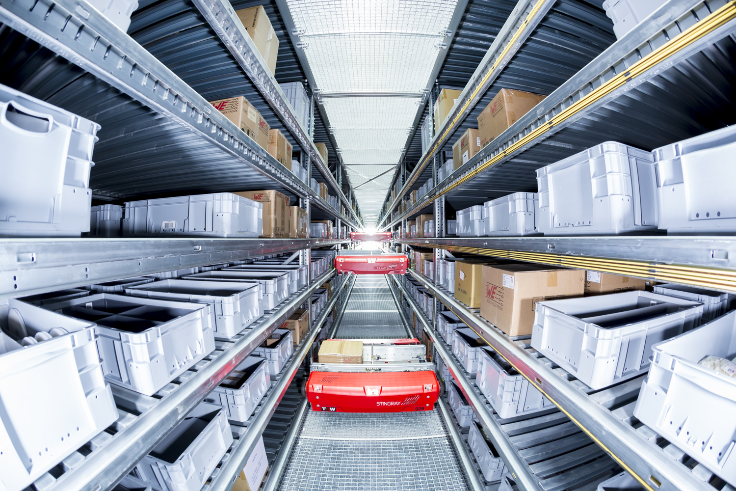 TGW Stingray Shuttle-System beim deutschen Kunden Würth eiSos Elektronik.